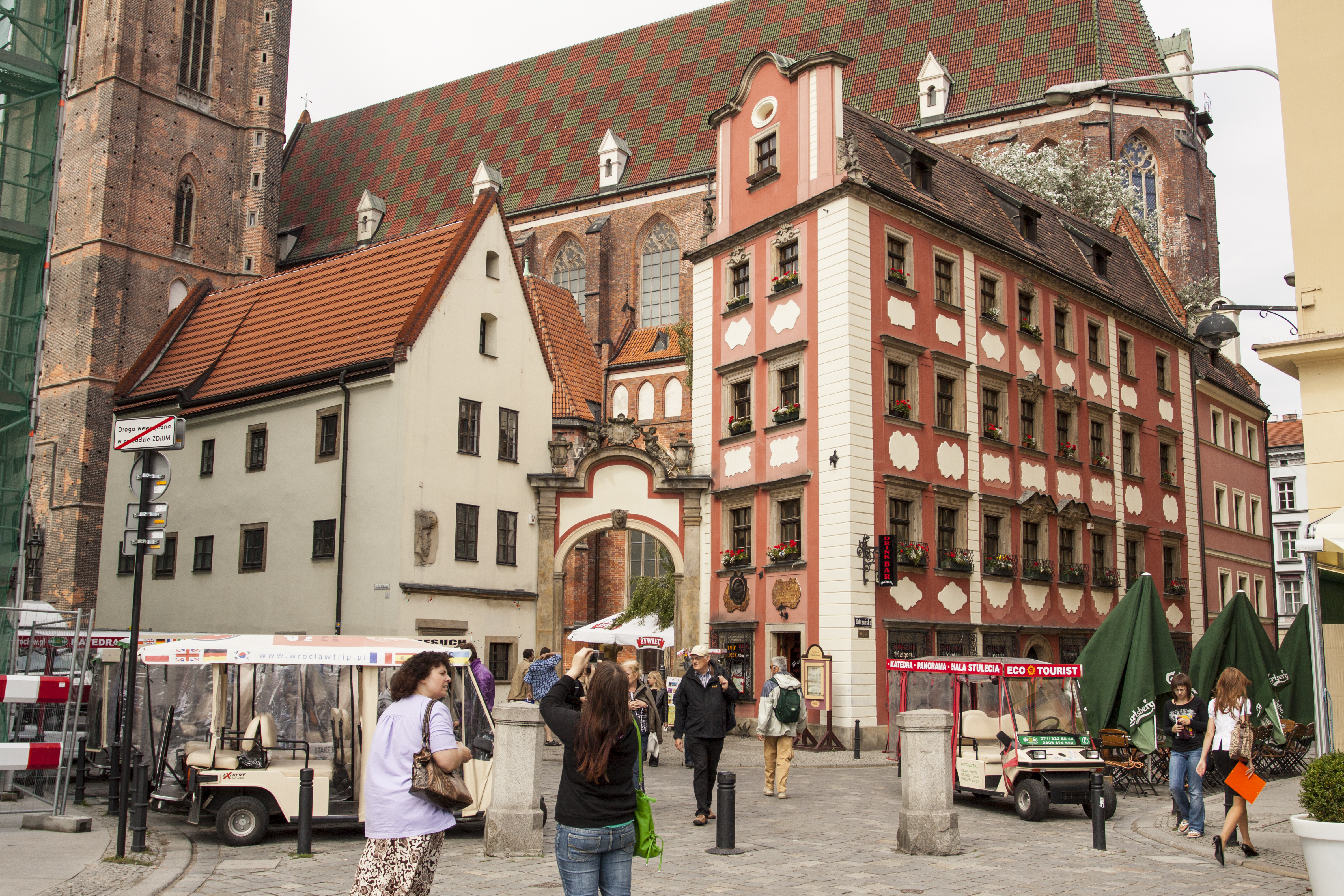 Dom altarystów „Jaś” św. Mikołaja 1, Miasto Wrocław - Stare Miasto